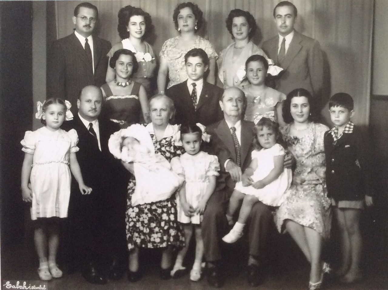 Sezai Selek ve ailesi